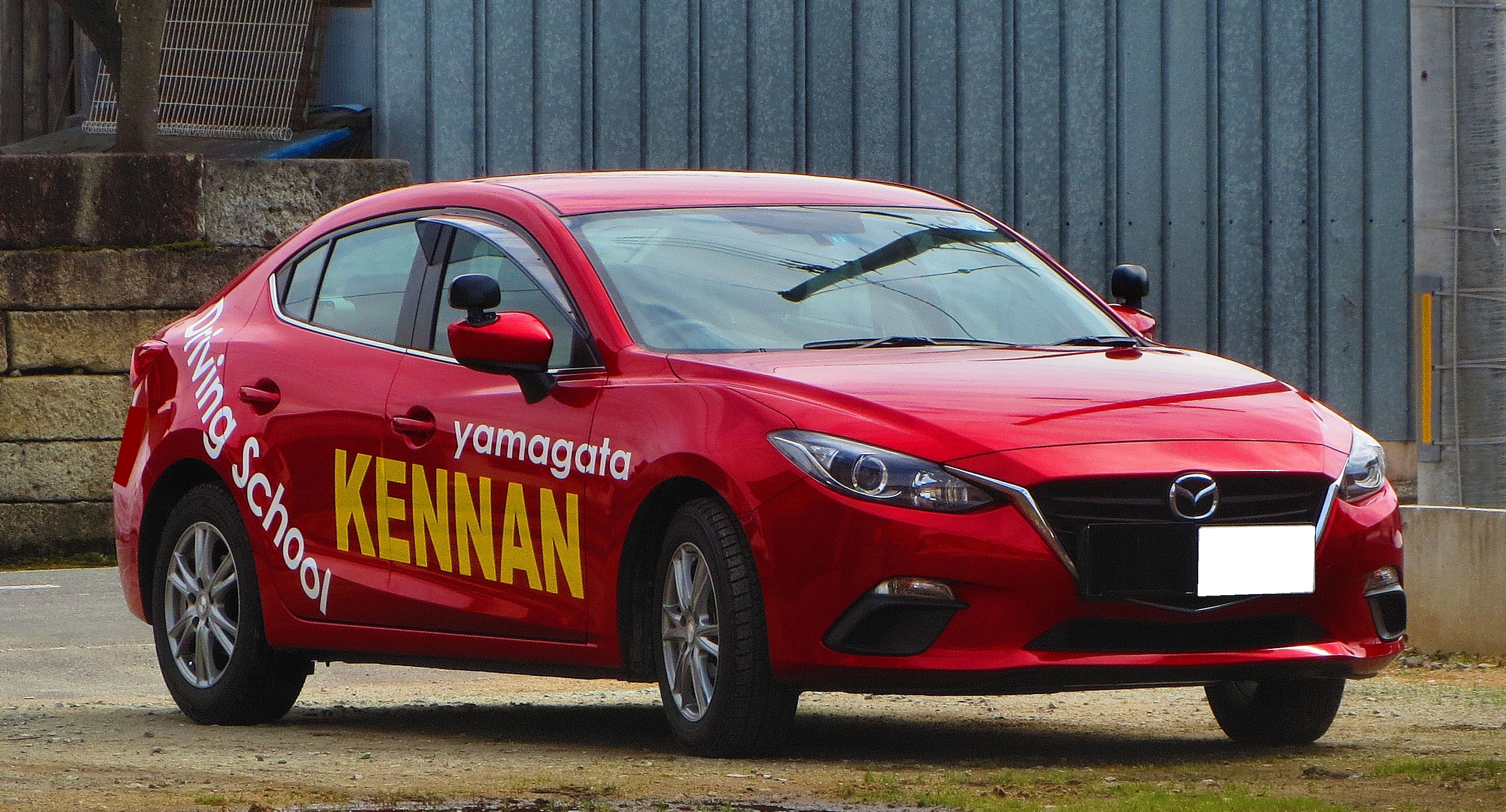 マツダ アクセラ 県南自動車教習車（山形県)